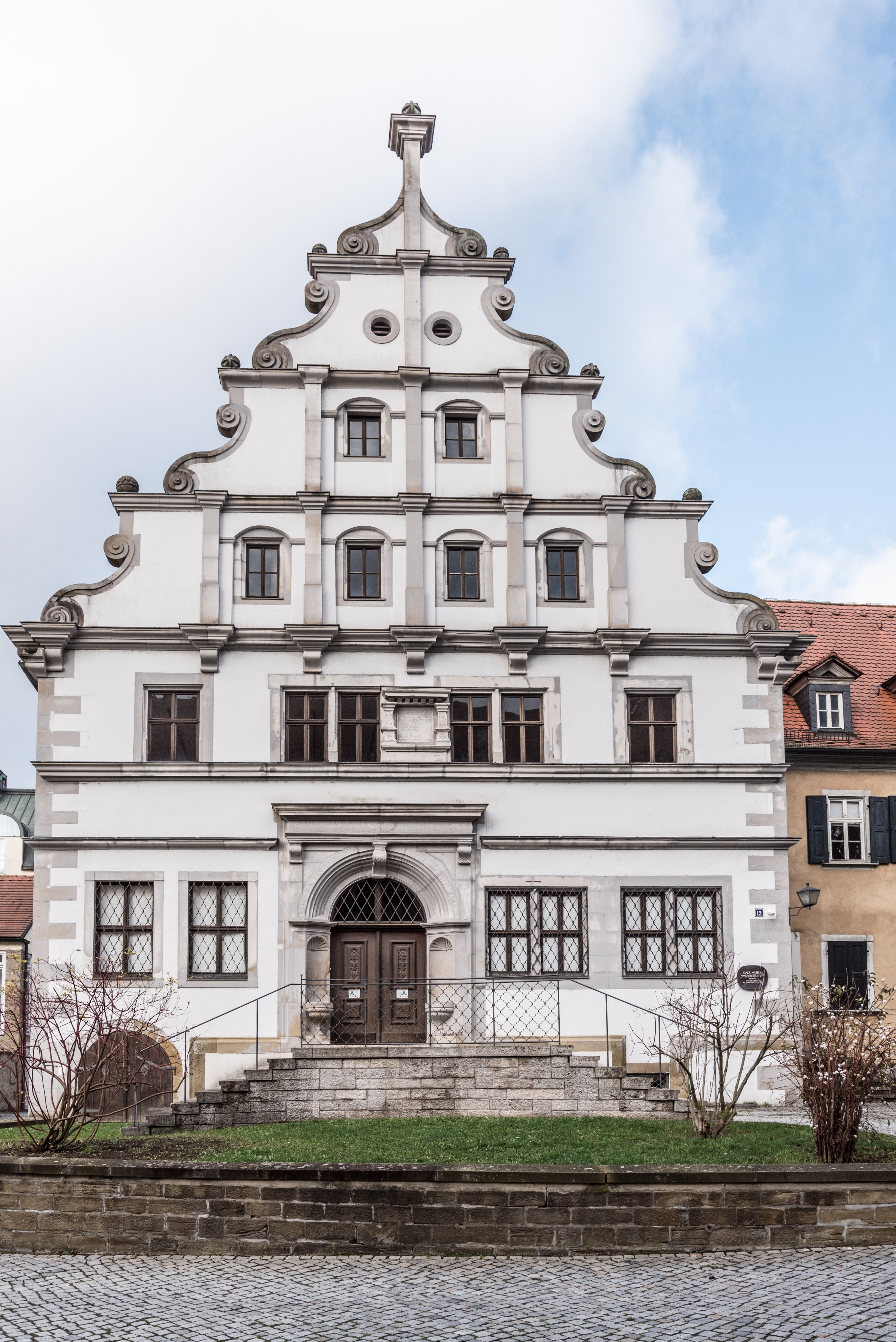 Schweinfurt, Martin-Luther-Platz 12, Altes Gymnasium